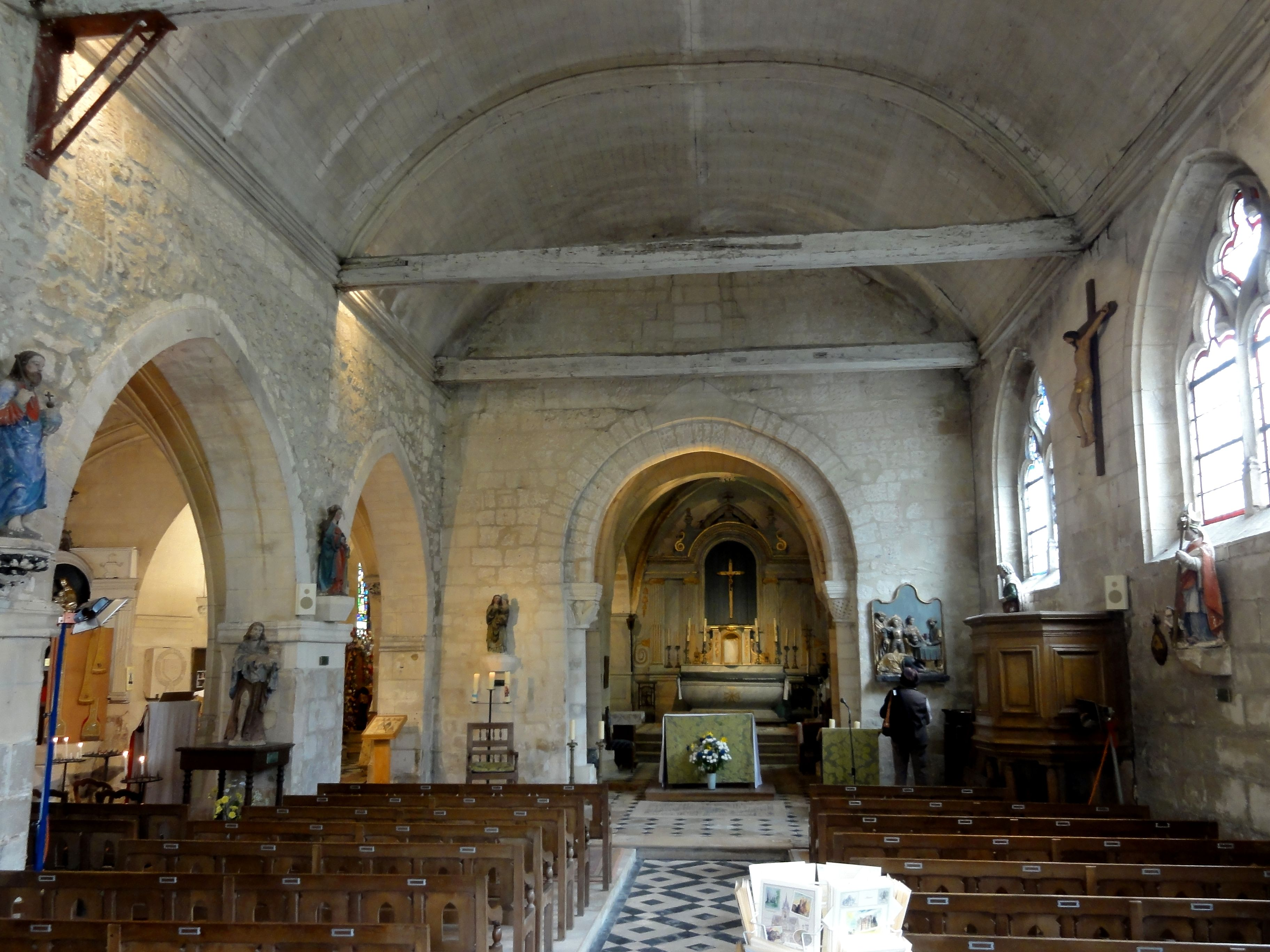 Nef sud, vue vers l'est.